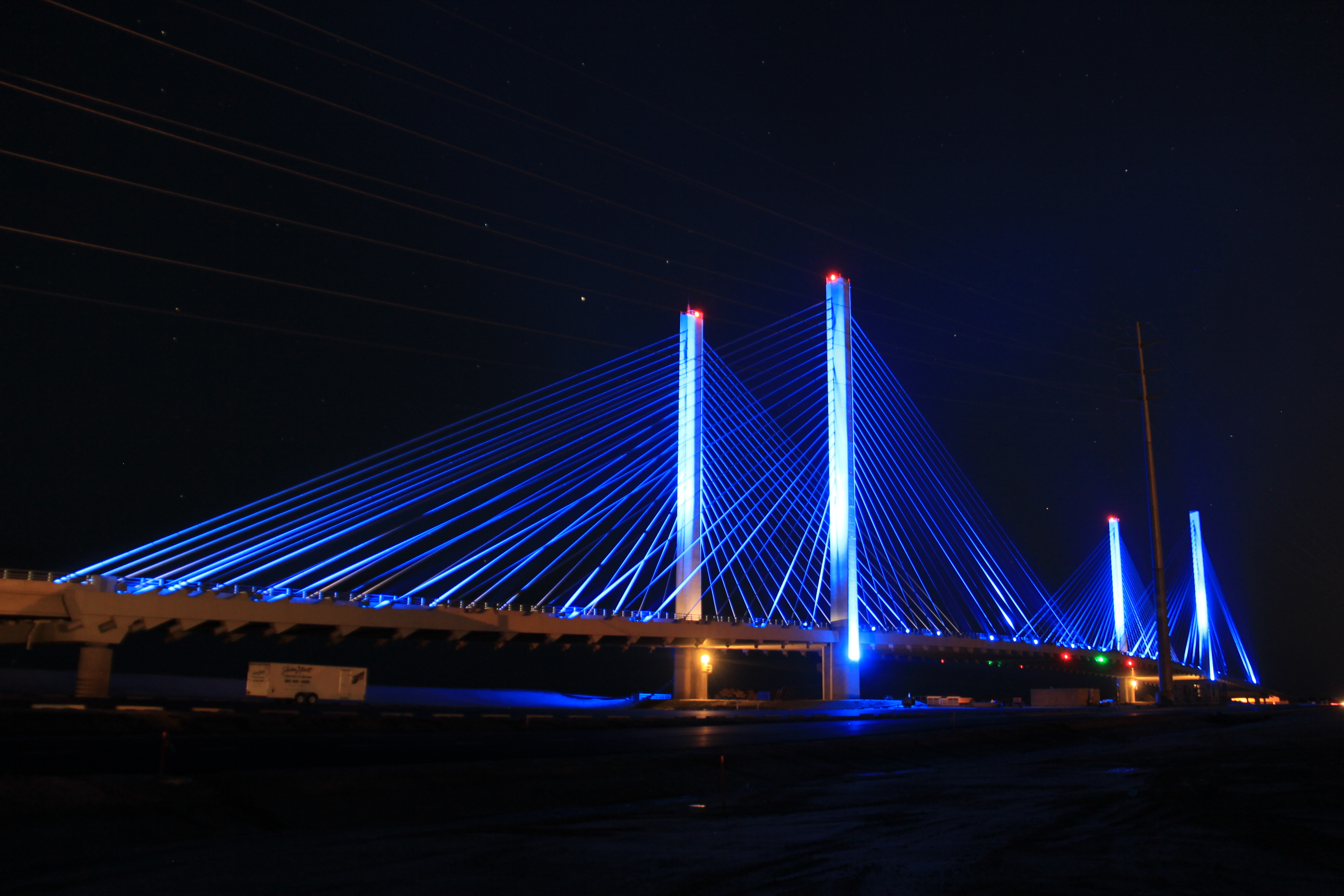 Indian river inlet bridge